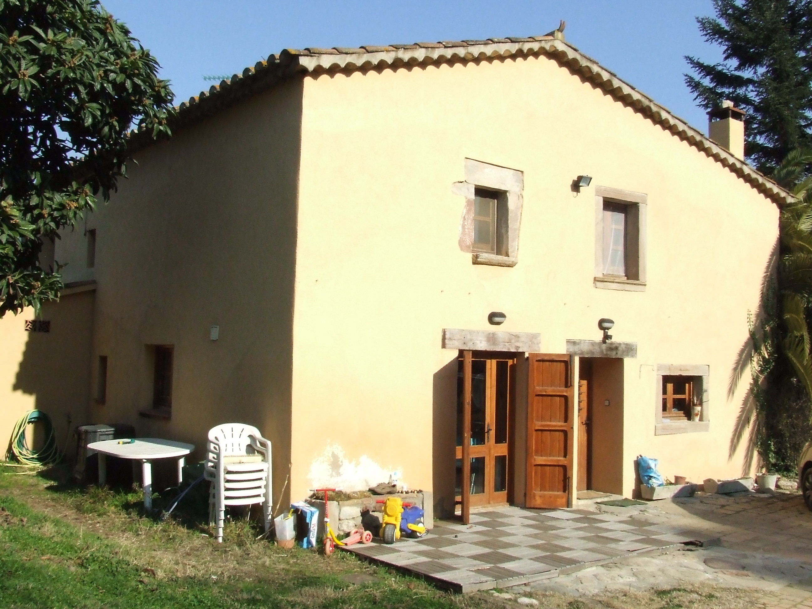 Can Pere Vedell (Bigues, Bigues i Riells, Vallès Oriental)